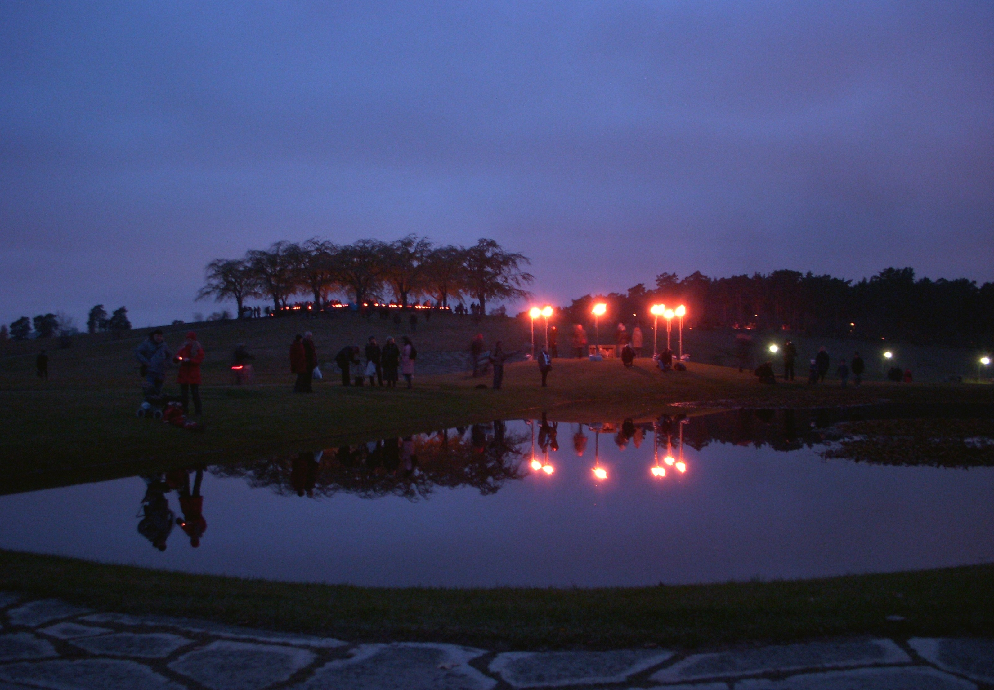 Skogskyrkogården i Stockholm, Meditationslunden